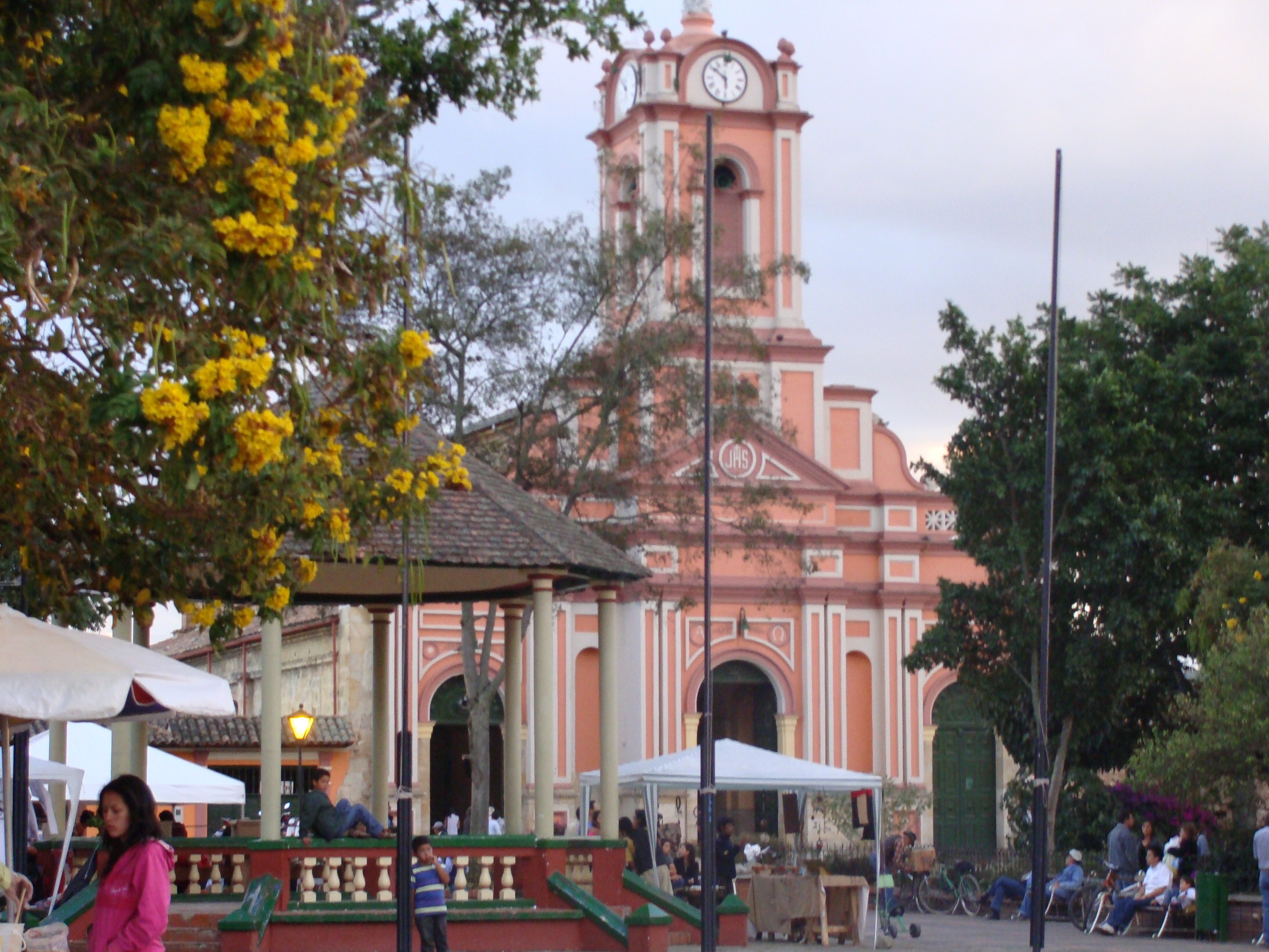 Ubicación: TABIO, CUNDINAMARCA